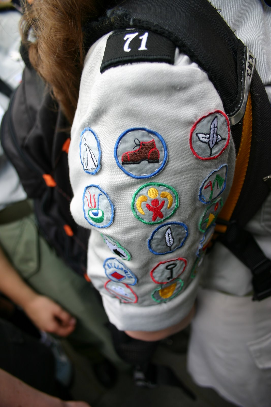 Zdjęcie przedstawiające harcerskie sprawności